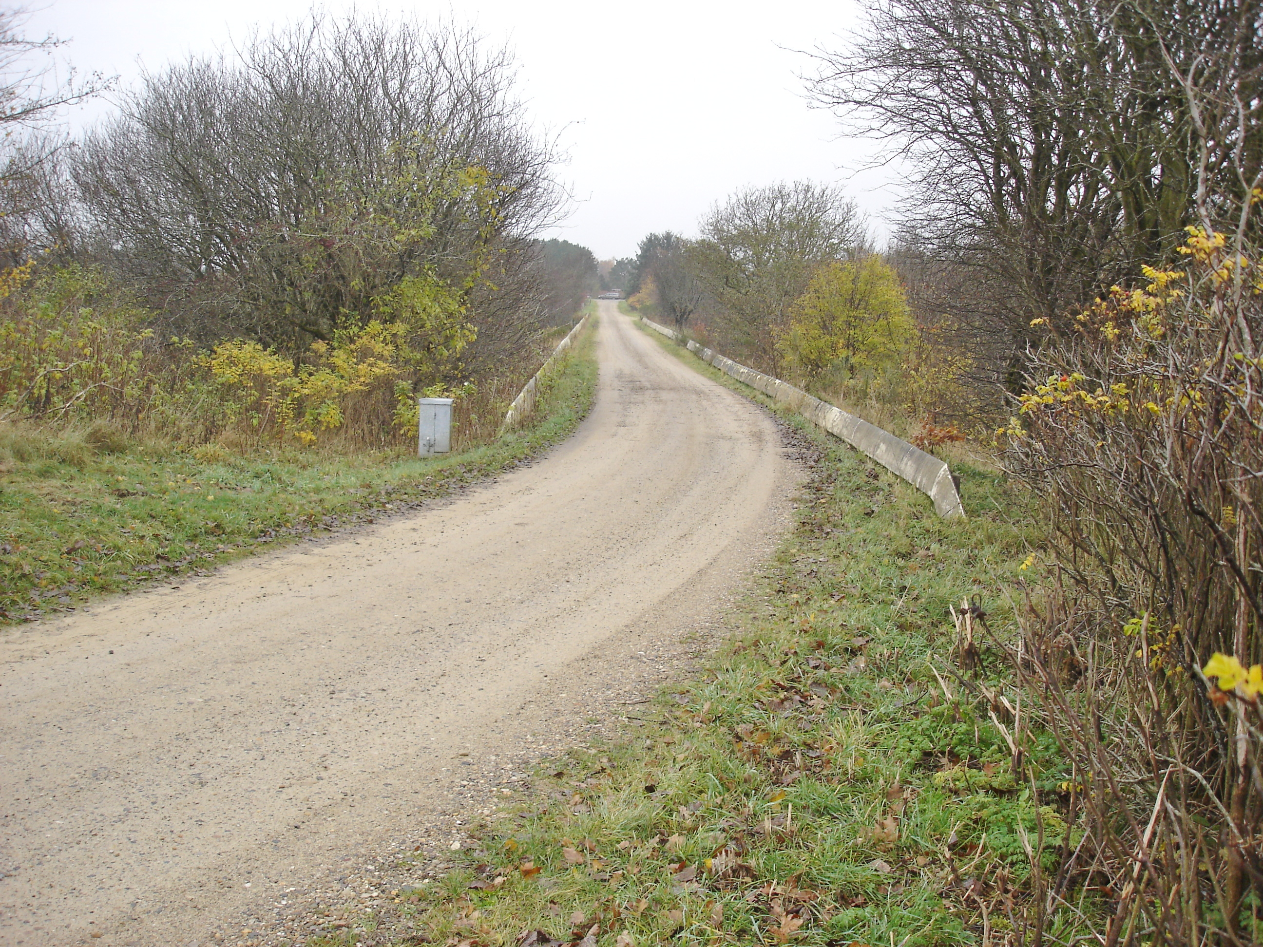 Dette stykke af Kirkevej, der fører over Gårsdal Bæk, ligger på Langå-Struer banens gamle tracé gennem Ravnstrup